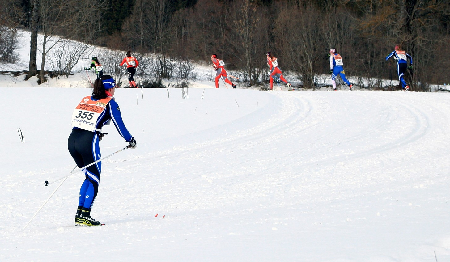 Foulée blanche 2019, à Autrans, Autrans-Méaudre-en-Vercors, Isère, AuRA, France.